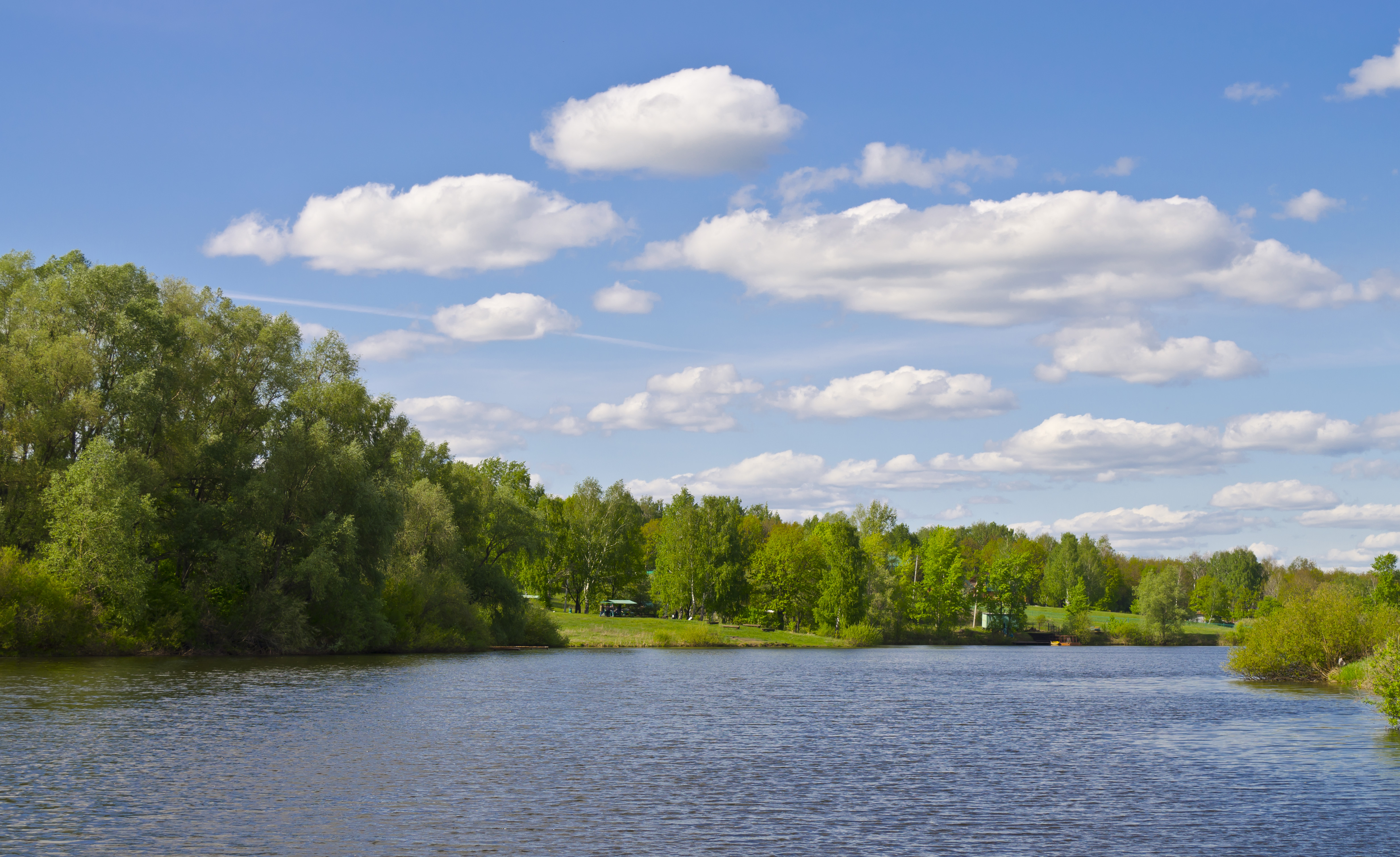 Pond Kuz'minovsky (Кузьминовский пруд)